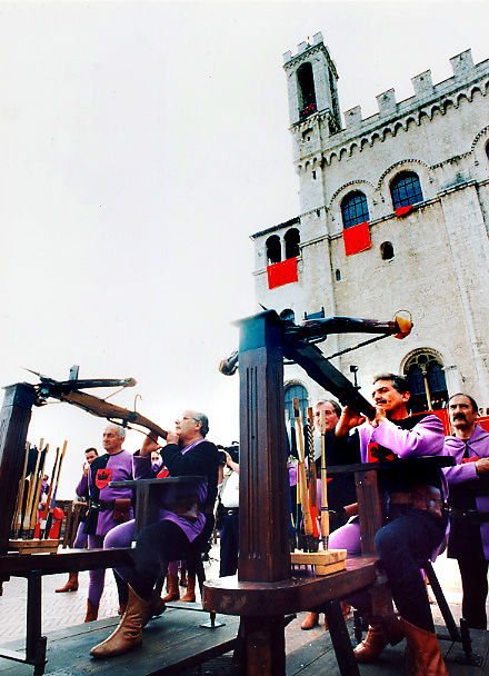 Gubbio (Perugia - Italy): Balestrieri eugubini durante il Palio della Balestra